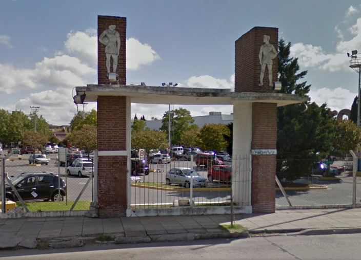 Vieja entrada al estadio, abajo de ella se ubica una placa conmemorativa recordando que allí hubo un estadio